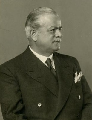 Tánczos Gábor vezérőrnagy, 1919-ben a Friedrich-kormány ideiglenesen megbízott külügyminisztere; Szenes, Koller utódja fényképén